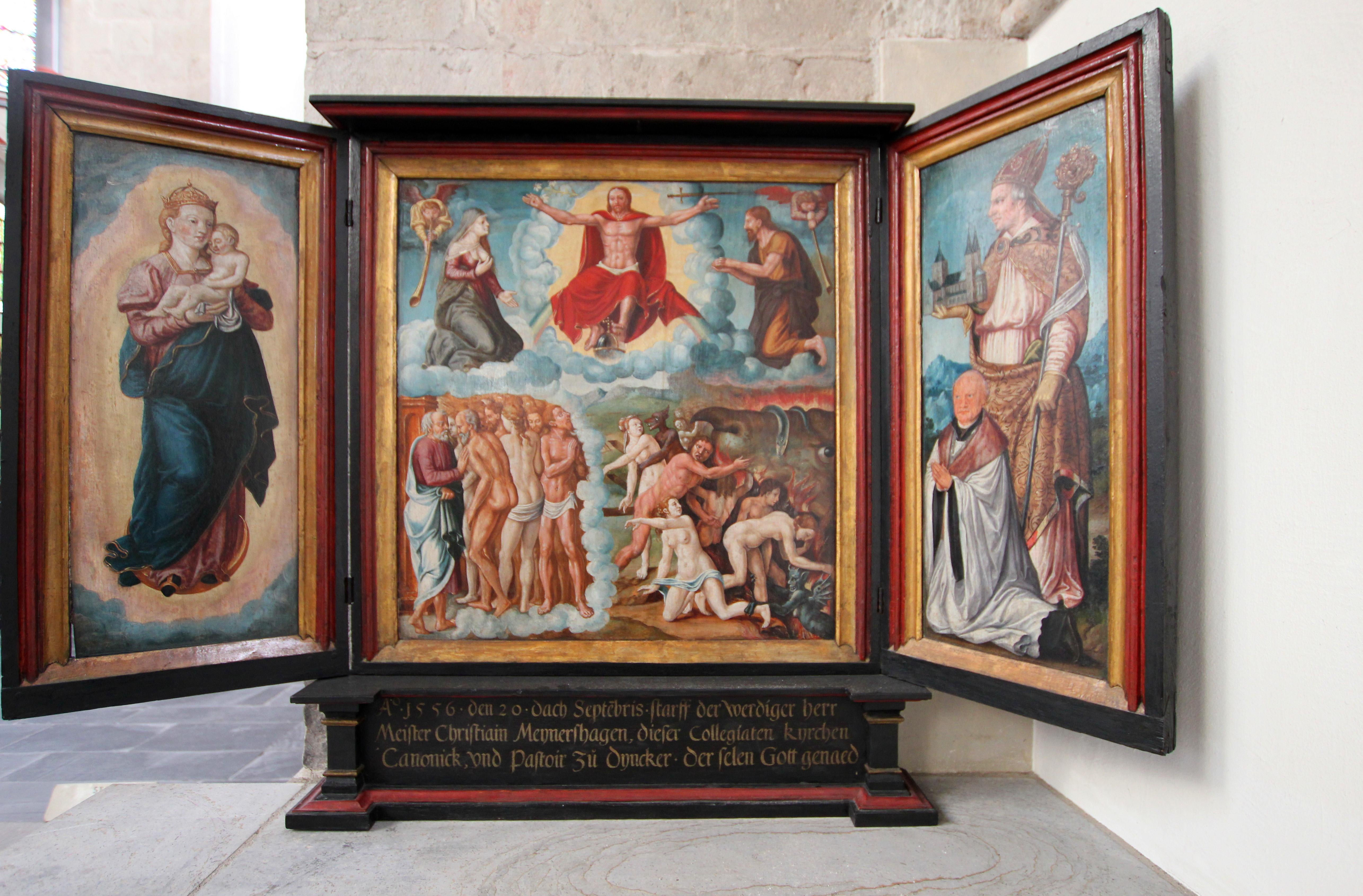 Köln Altstadt-Nord, St. Kunibert. Triptychon aus der Schule des Barthel Bruyn, Mitte des 16. Jahrhunderts. Stifter war der Canonikus und Pfarrer Christian Meinershagen. Das Bild, heute in der Kirche St. Kumibert, befand sich in der alten Propstei dem späteren Pfarrhaus. Daten: Öl auf Holz, Höhe 0, 71 m, Breite des Mittelstückes 0,63 m, Breite der Flügel 0,34 m